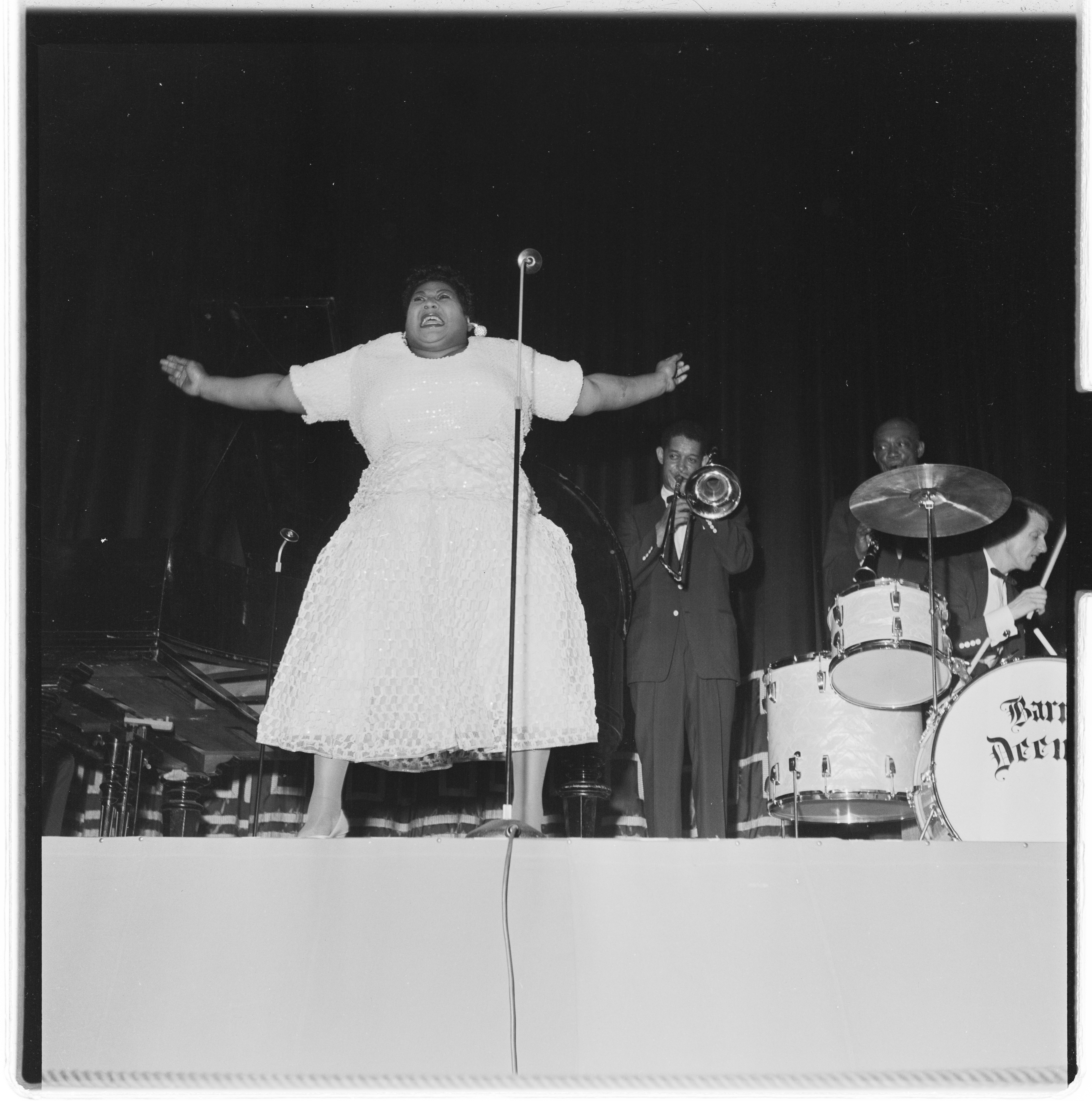 Bildet er hentet fra Arkivverket. Louis Armstrong til Oslo og konserter. NÅ nr. 42, 1955. Arkivinstitusjon : Riksarkivet Arkivnavn : Billedbladet NÅ Sted : Norge, Oslo, Oslo, Emneord: Jazz, Konsert, Musikk Avbildet